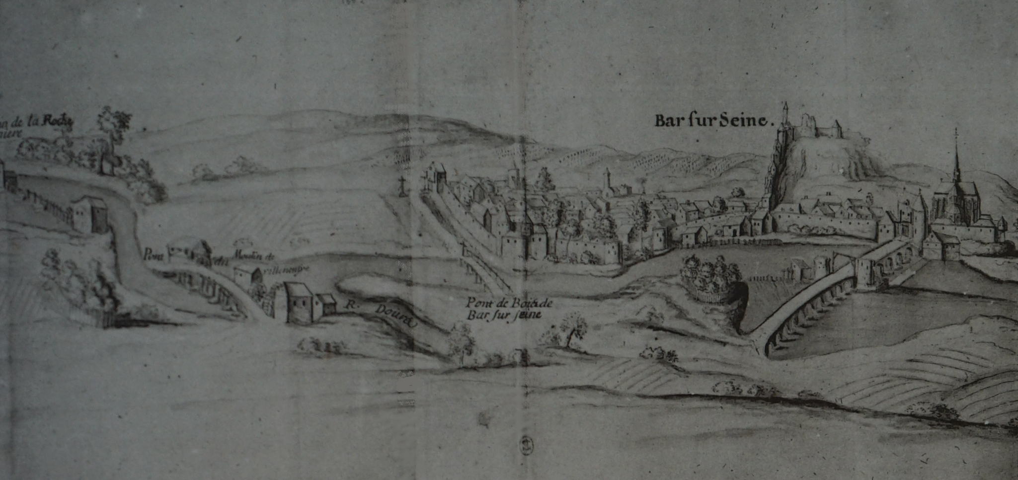 image de la seine à bar sur seine.